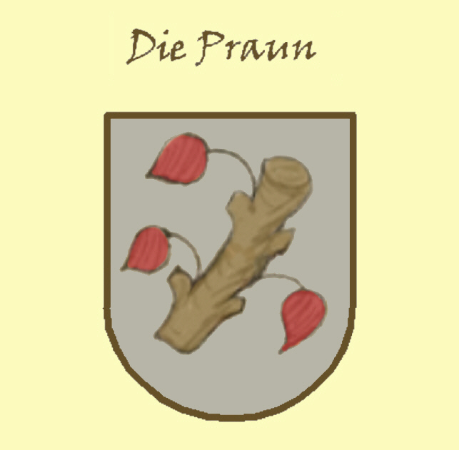 Wappen der Nürnberger Patrizierfamilie Praun